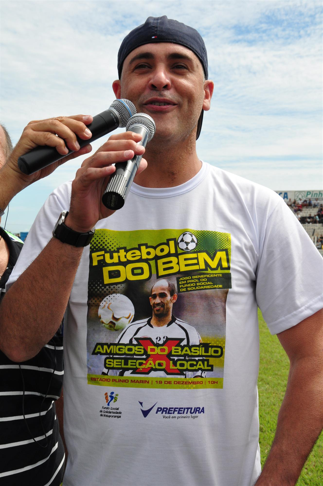 Foto: André Luiz D. Takahashi